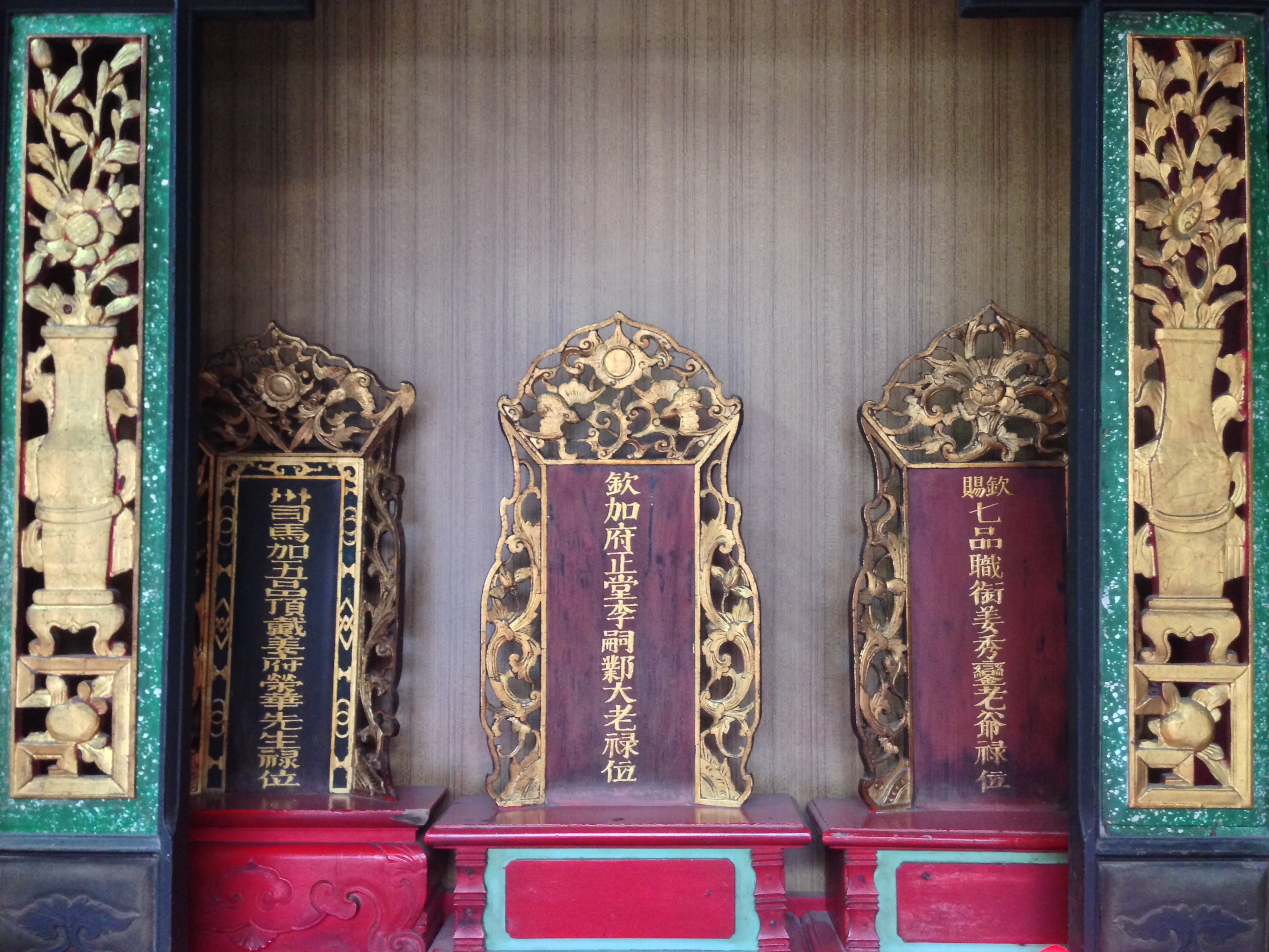 中文（台灣）: 慈天宮李嗣鄴、姜秀鑾、江榮華之祿位